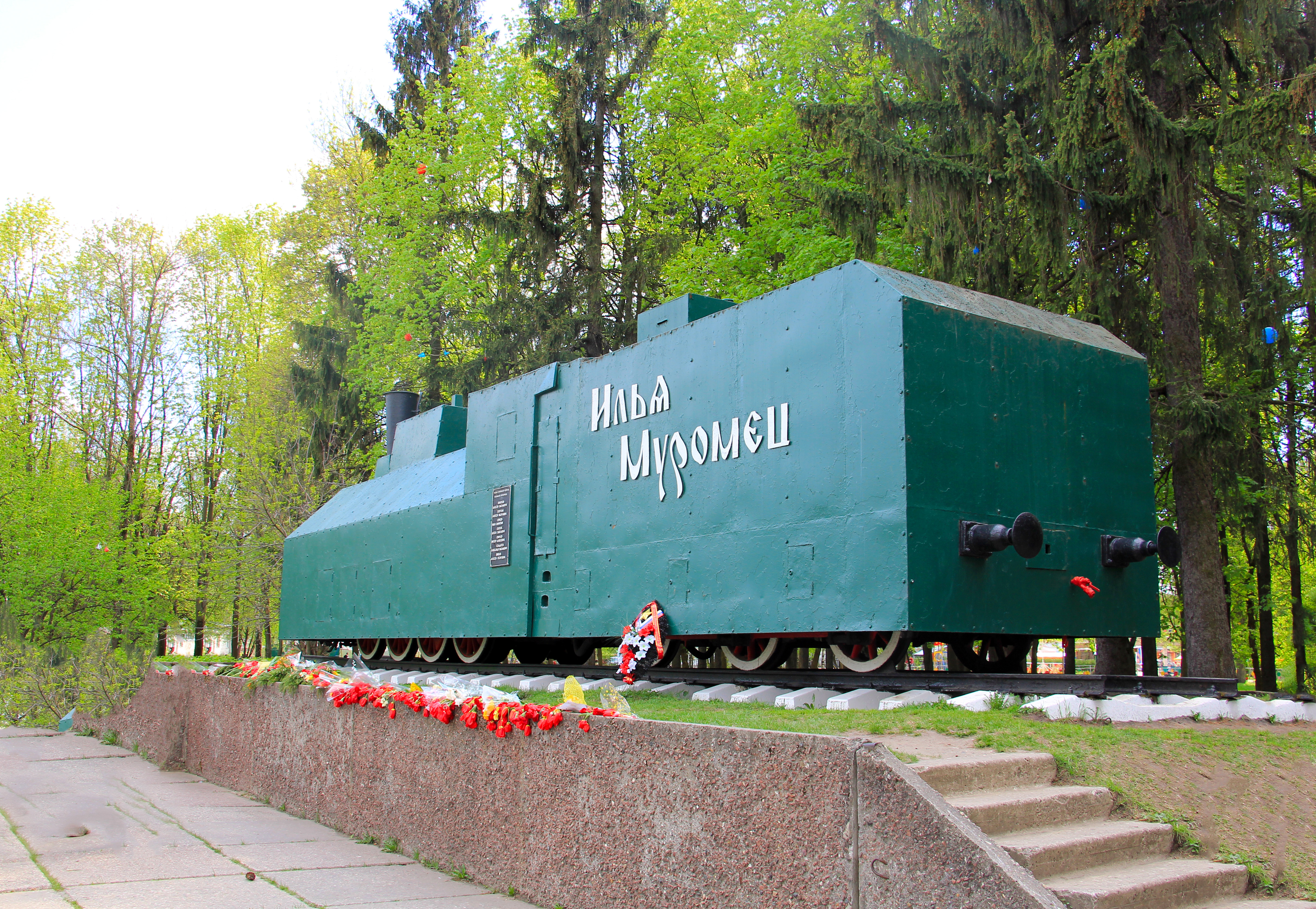 Бронепоезд "Илья Муромец", установленный в честь 26-й годовщины Победы в Великой Отечественной войне: парк им.50-летия Советской власти, Муром, Владимирская область